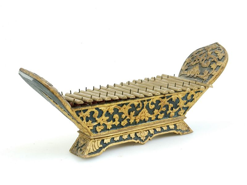 Model. Behoort tot een model van een gamelan-slèndro, bestaande uit 39 stukken.. Model van een xylofoon van metaal van een gamelan-orkest Unknown language: gambang